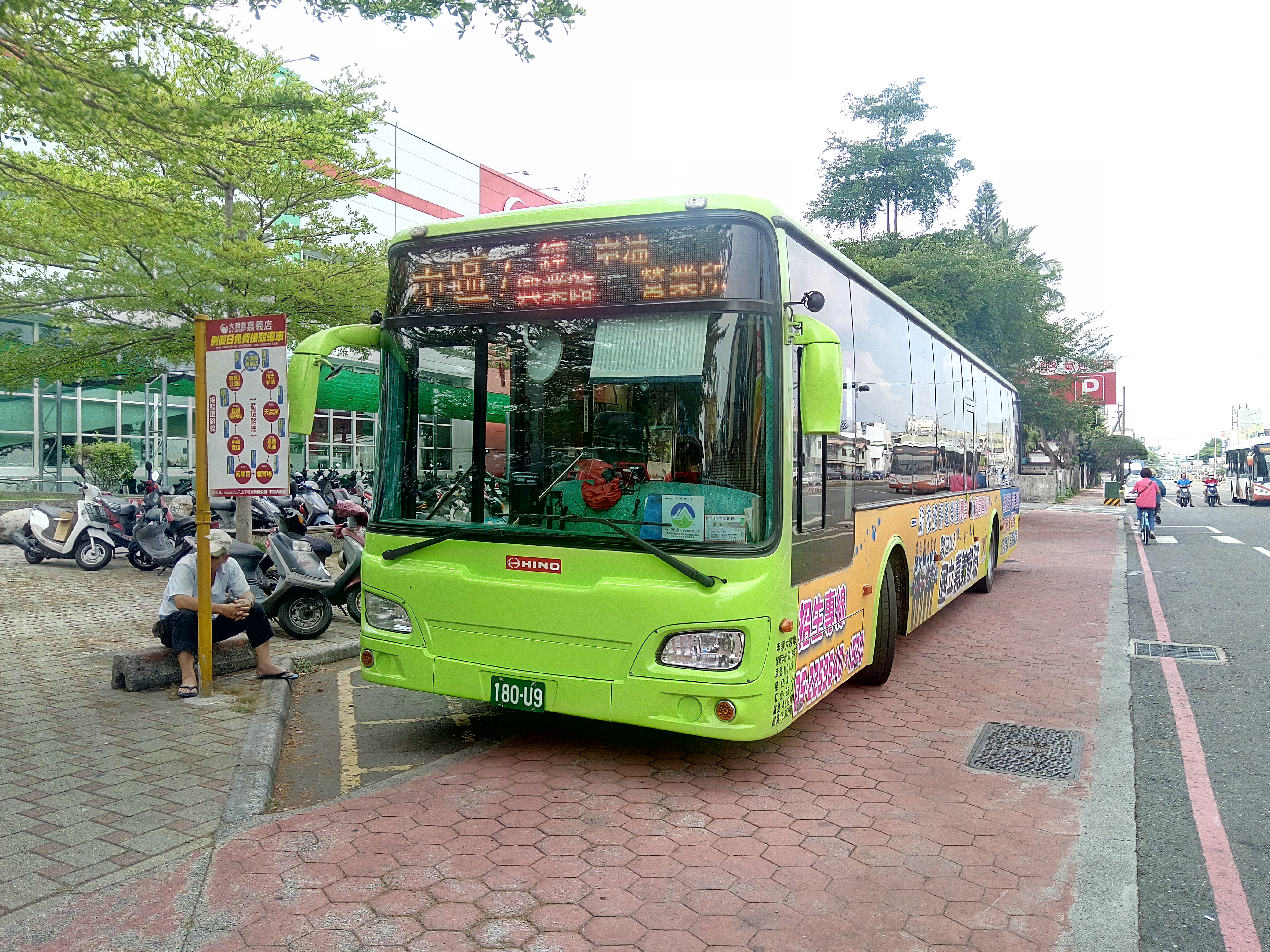 嘉義市バス市区7系統日野ノンステップバス初登場01052018